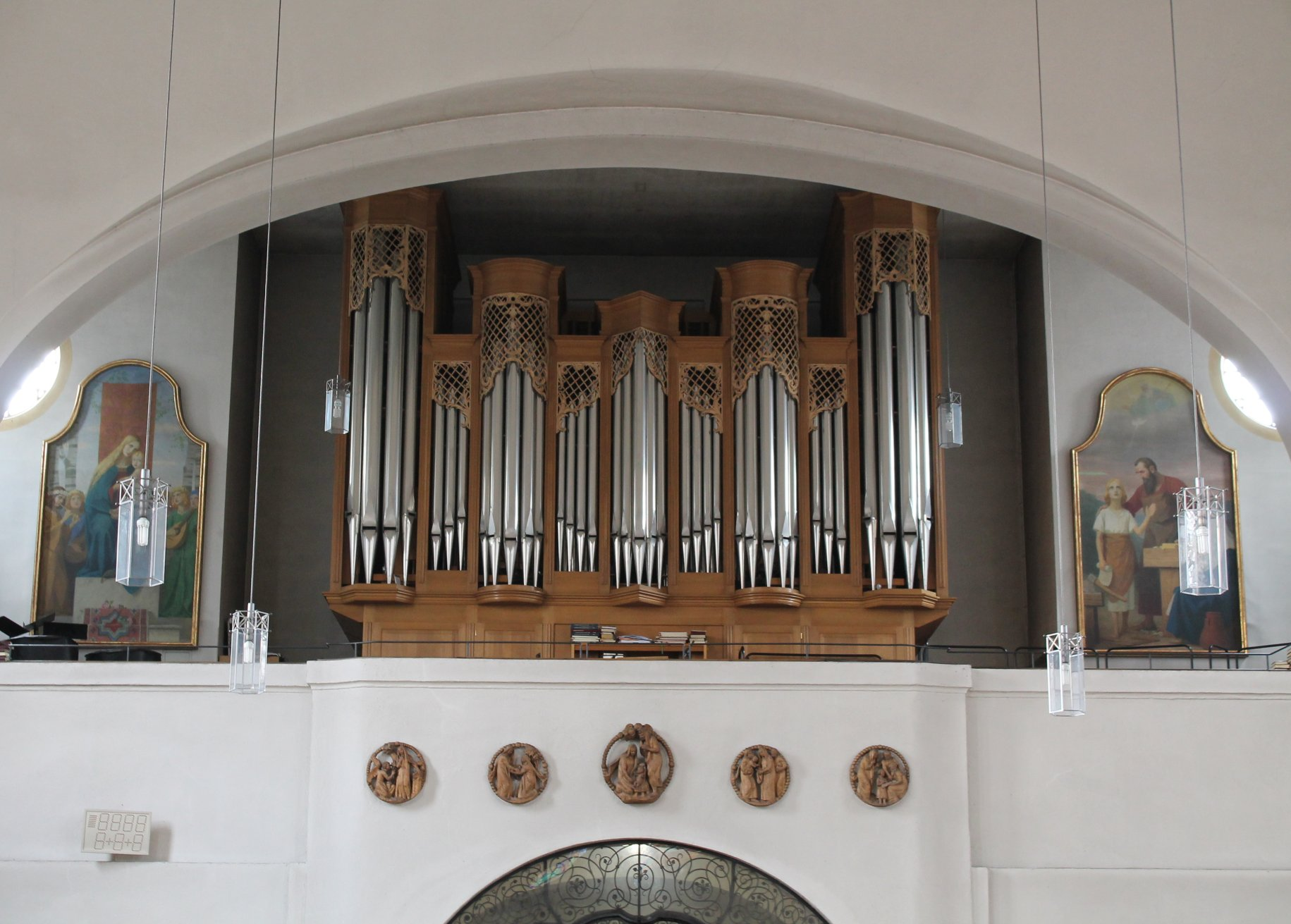 Orgel von St. Johann Baptist in München-Solln (1993, Schingnitz, II/33). Links und rechts die Altarbilder der ehemaligen Seitenaltäre von Gebhard Fugel. Darunter an der Brüstung der Orgelempore Relief-Medaillons von Balthasar Schmitt.